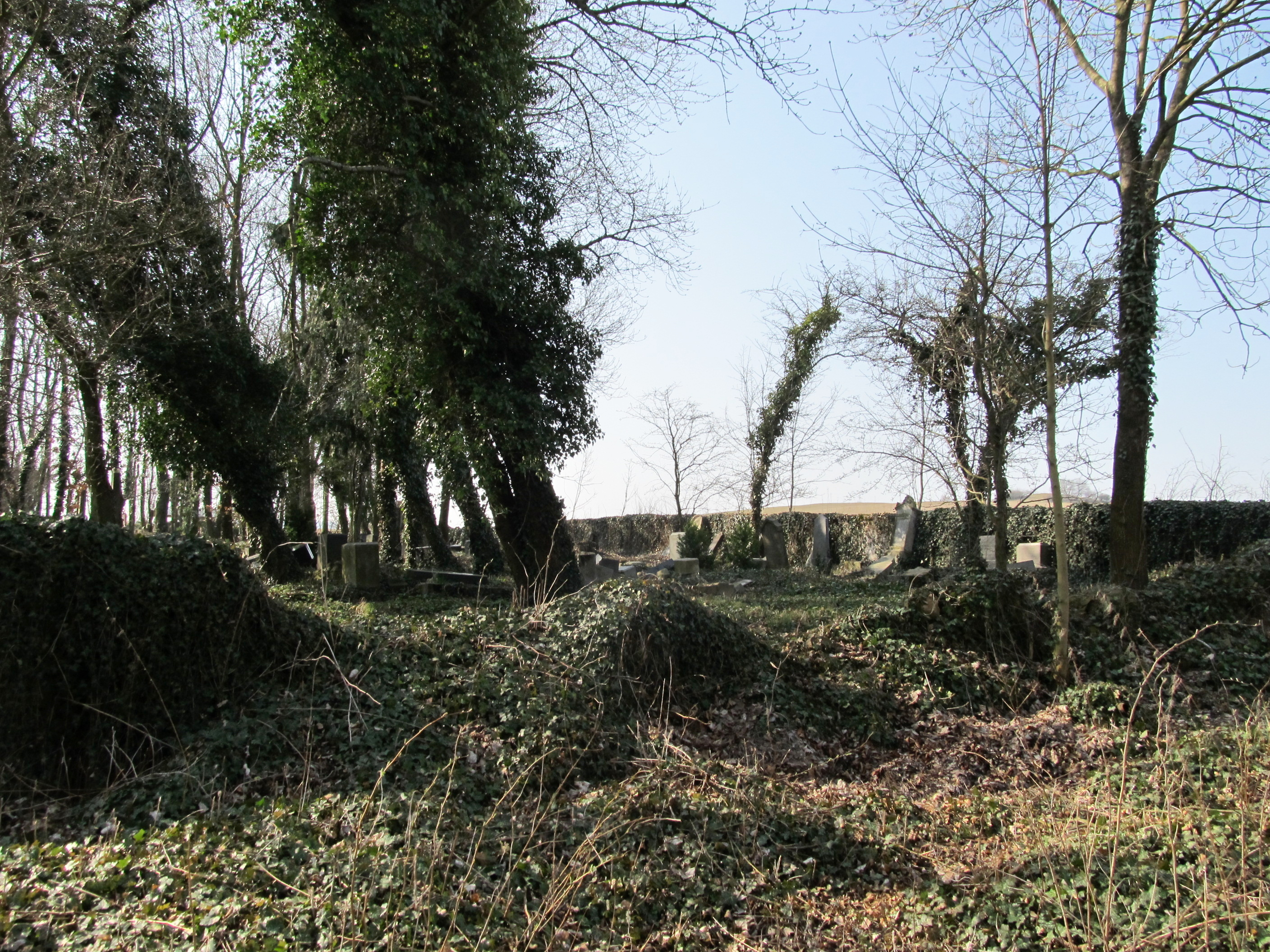 Terešov ŽH 01